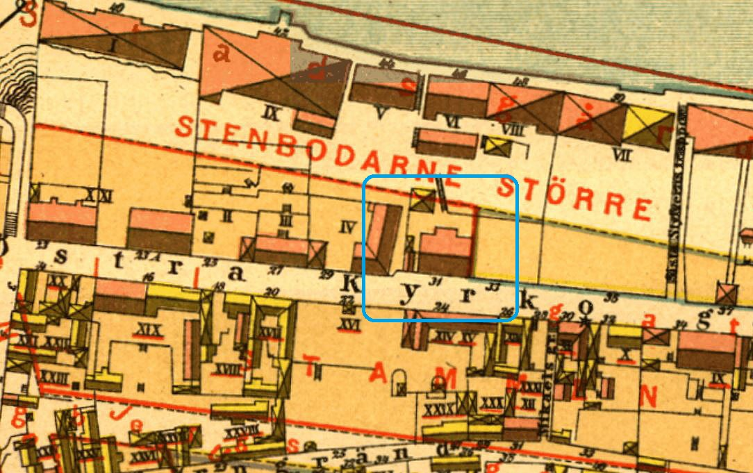 Del av Alfred Rudolf Lundgrens Stockholmskarta visande del av dagens Fjällgatan med Sommelius hus (i blå ram)